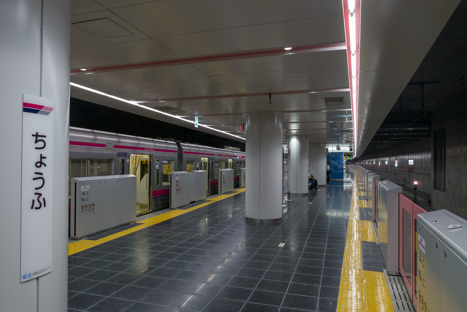 京王電鉄調布駅、地下化された上り線ホーム。